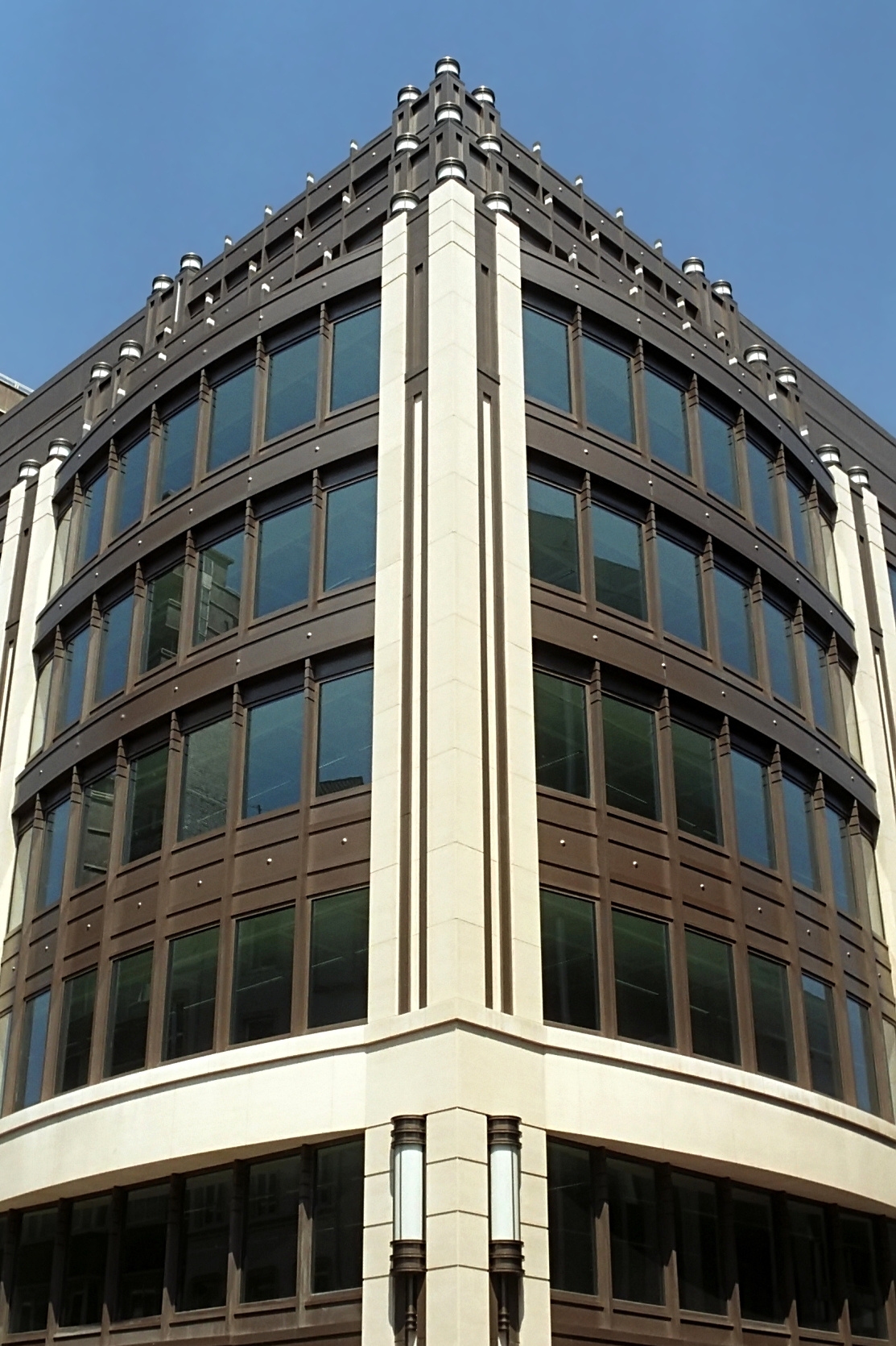 Belgique - Bruxelles - rue du Luxembourg 40 - immeuble « Luxembourg 40 » (Architecture postmoderne en Belgique - Atelier d'Art urbain)